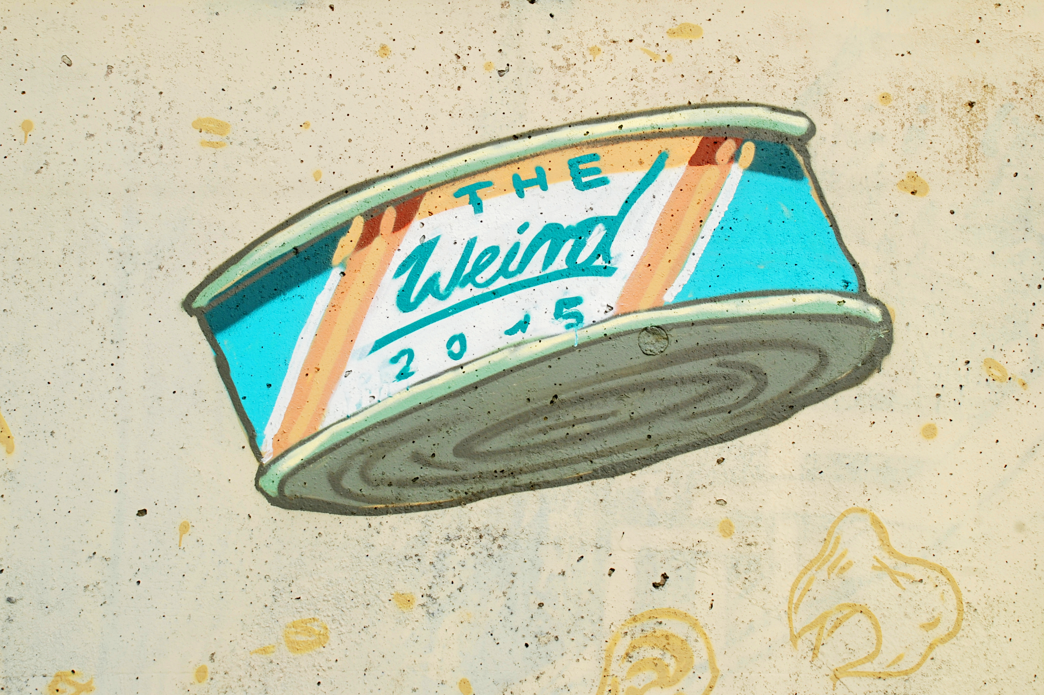 Belgique - Louvain-la-Neuve - Gare - Quai - Fresque du collectif The Weird (Kosmopolite Art Tour 2015 à Louvain-la-Neuve)